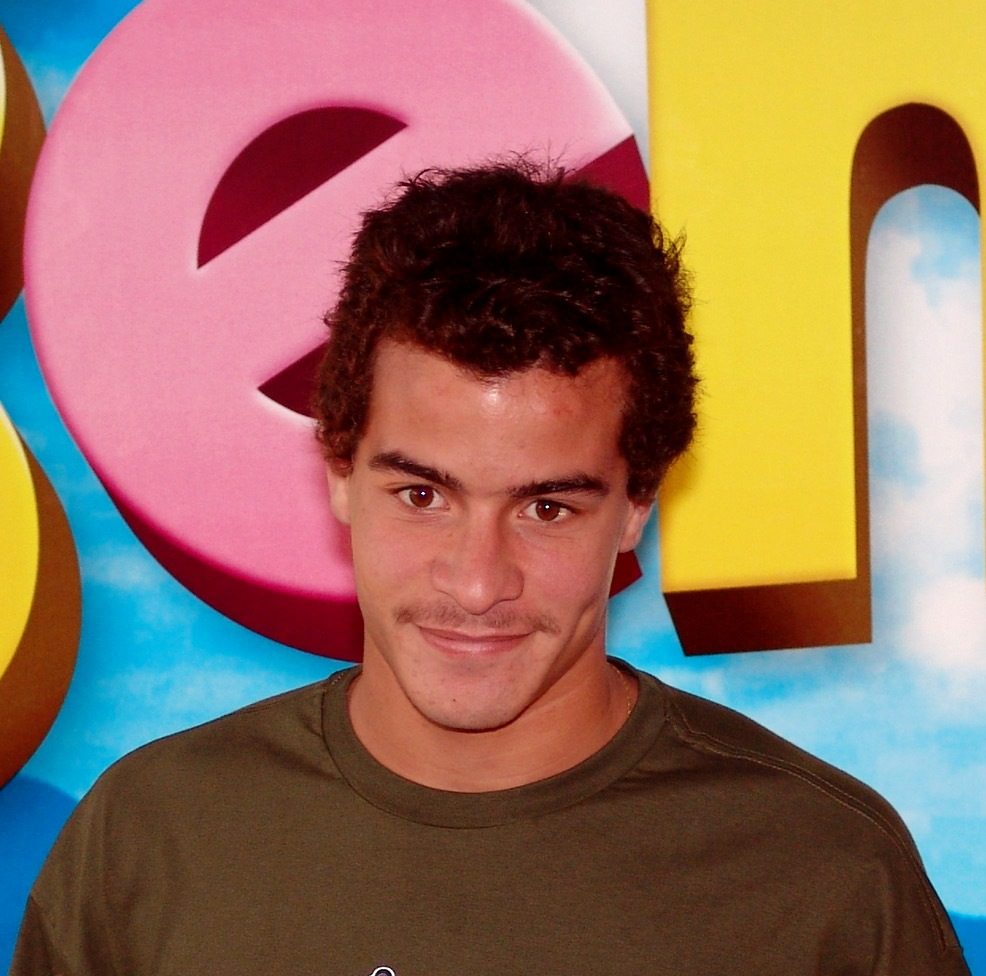 Thiago Martins na estreia do filme Xuxa Gêmeas em 2006.